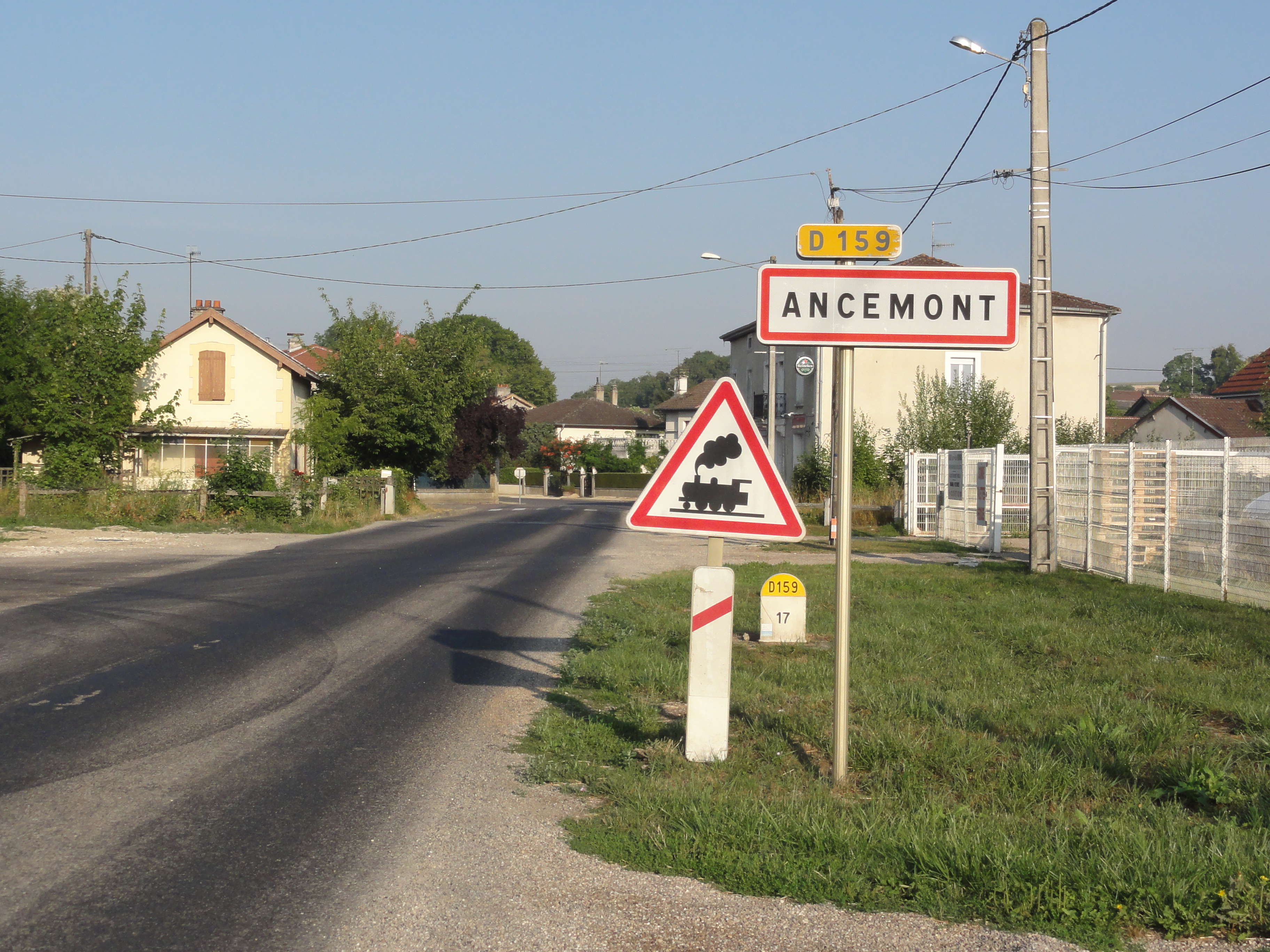 Ancemont (Meuse) city limit sign